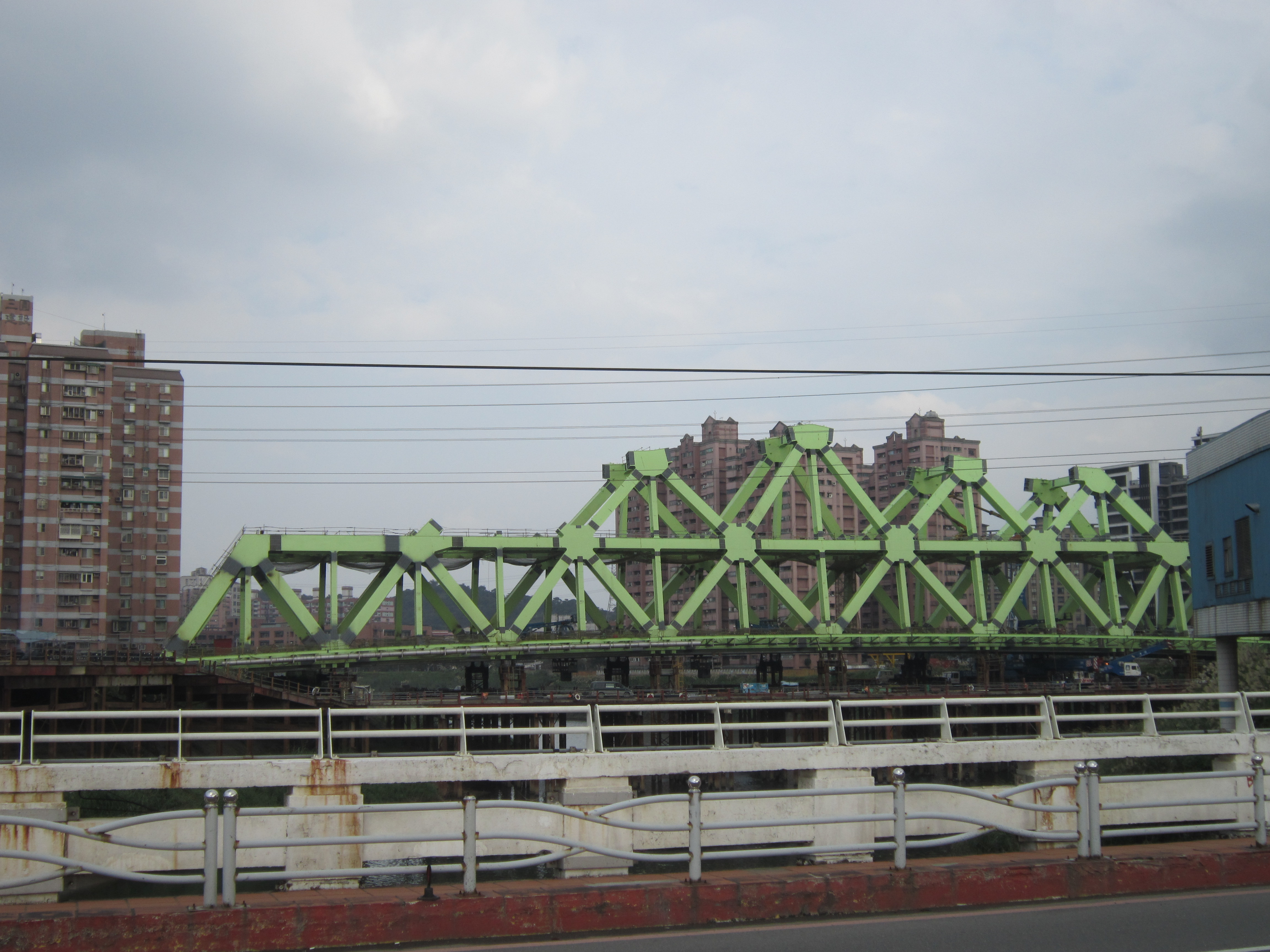 施工中的新社后橋,其為雙層的華倫式桁架橋